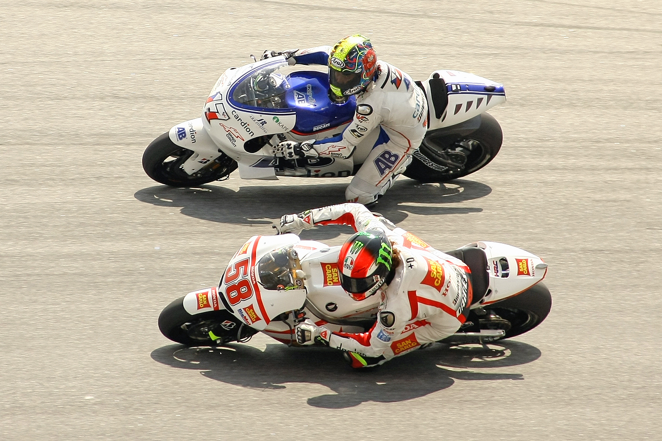 @ Sepang MotoGP